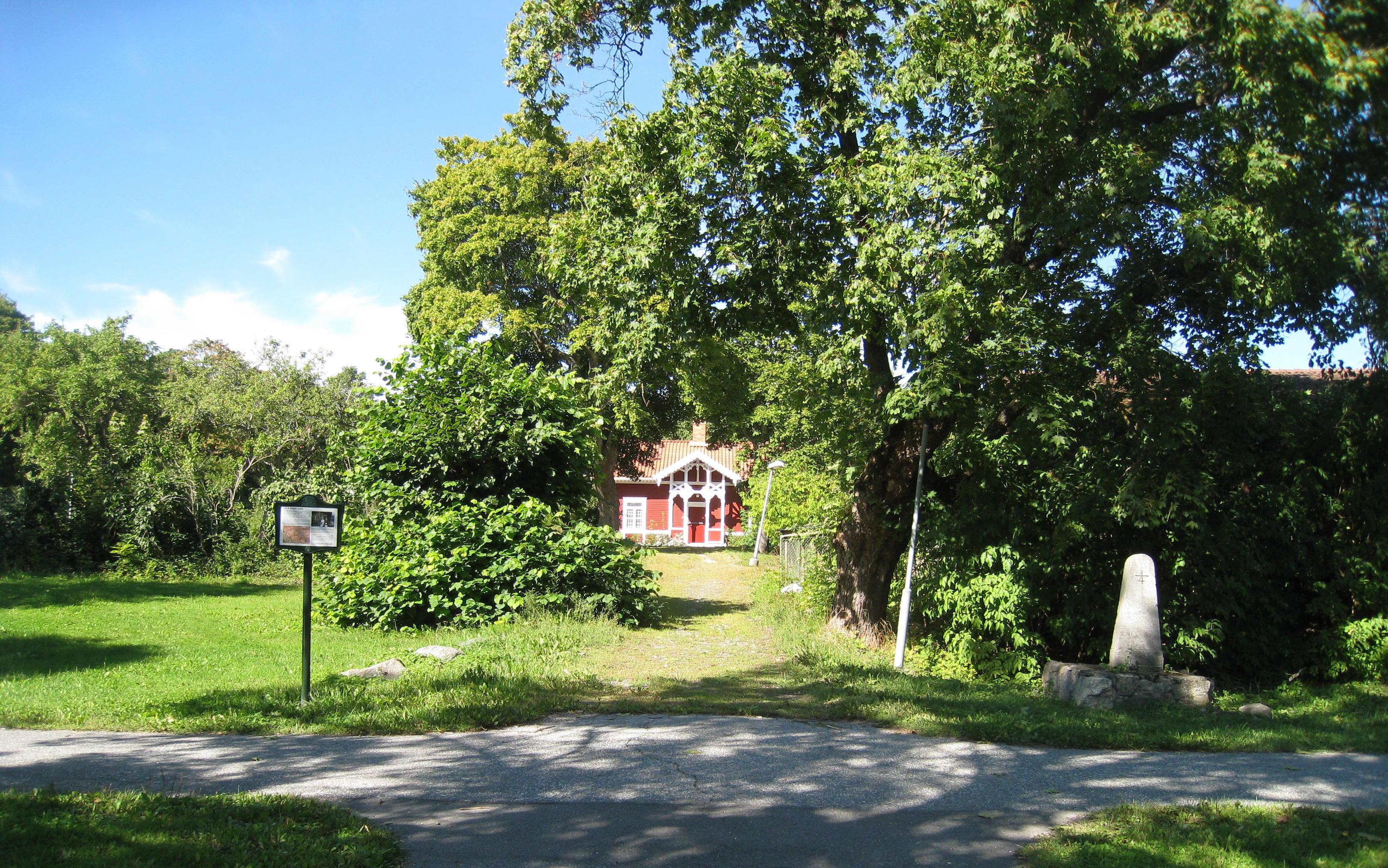 Lilla Ängby gård på Blackebergsvägen i Blackeberg i Bromma, väster om Stockholm. Torpstugan ligger vid gränsen till Södra Ängby och ligger utmed 1600-talets landsväg mellan huvudstaden och färjeläget vid Tyska Botten. Till vänster syns informationsskylt om gården och till höger syns 1/4 milstenen från 1778.